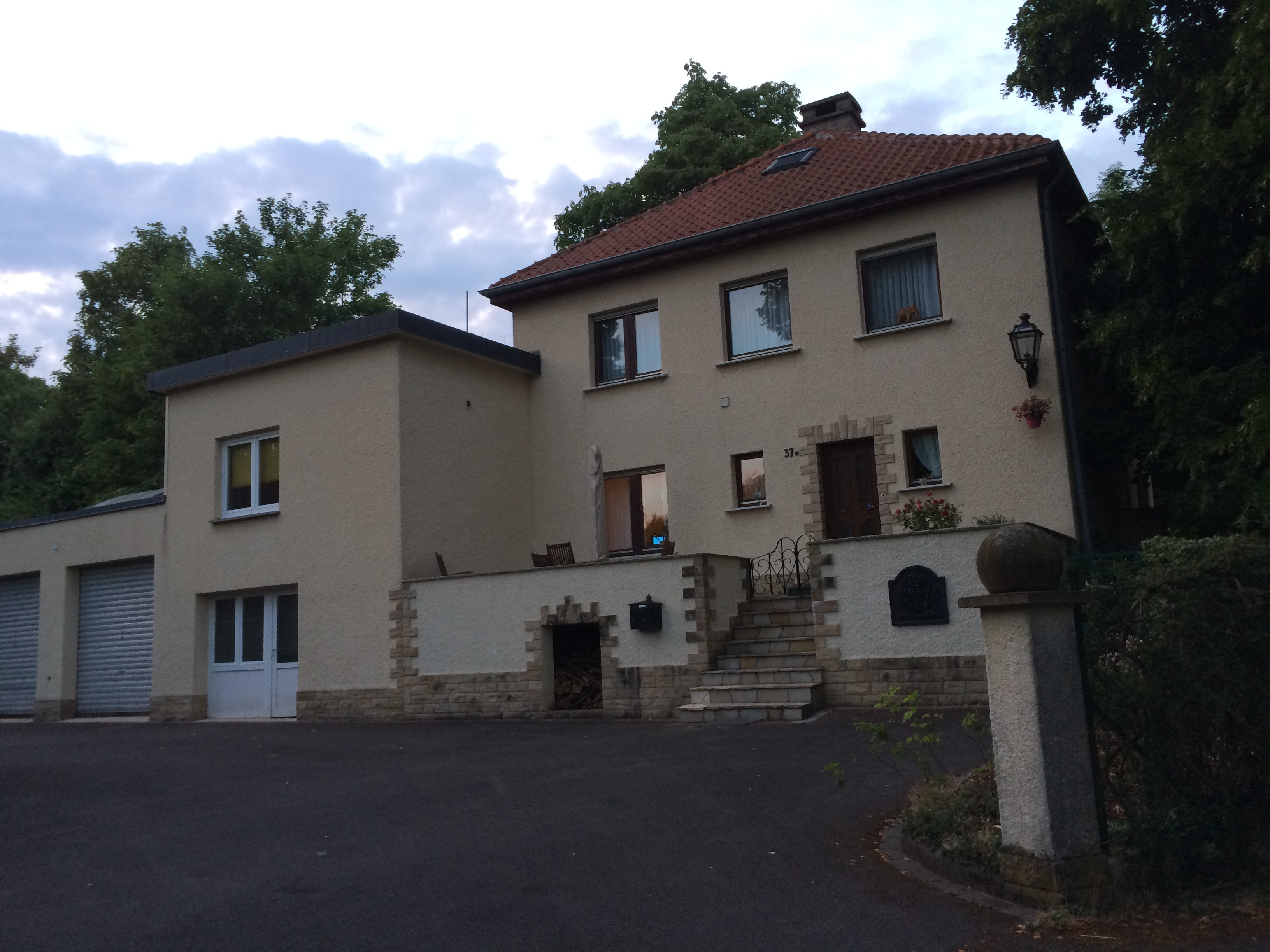 Schloss Senningerberg